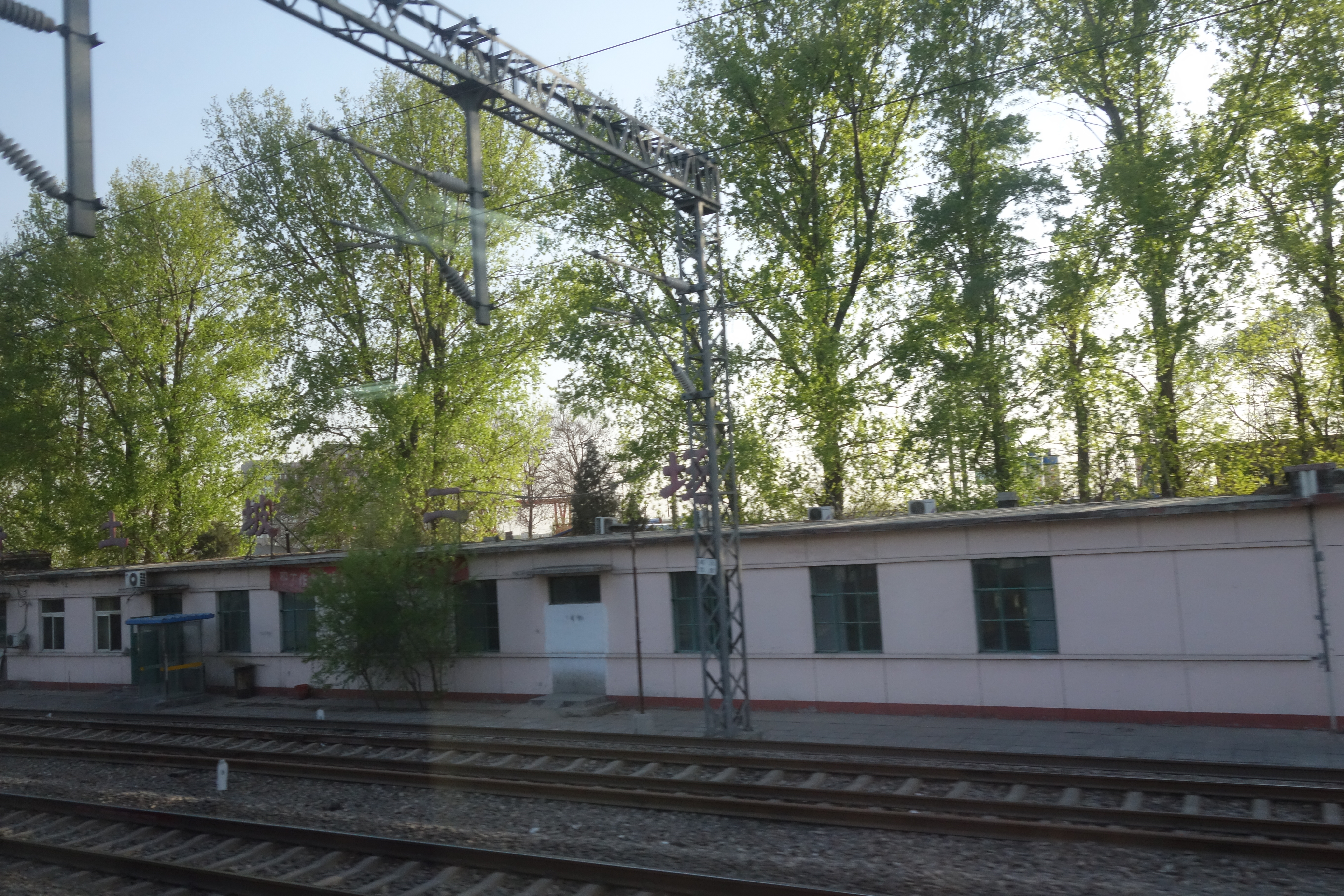 黄土坡站，北京